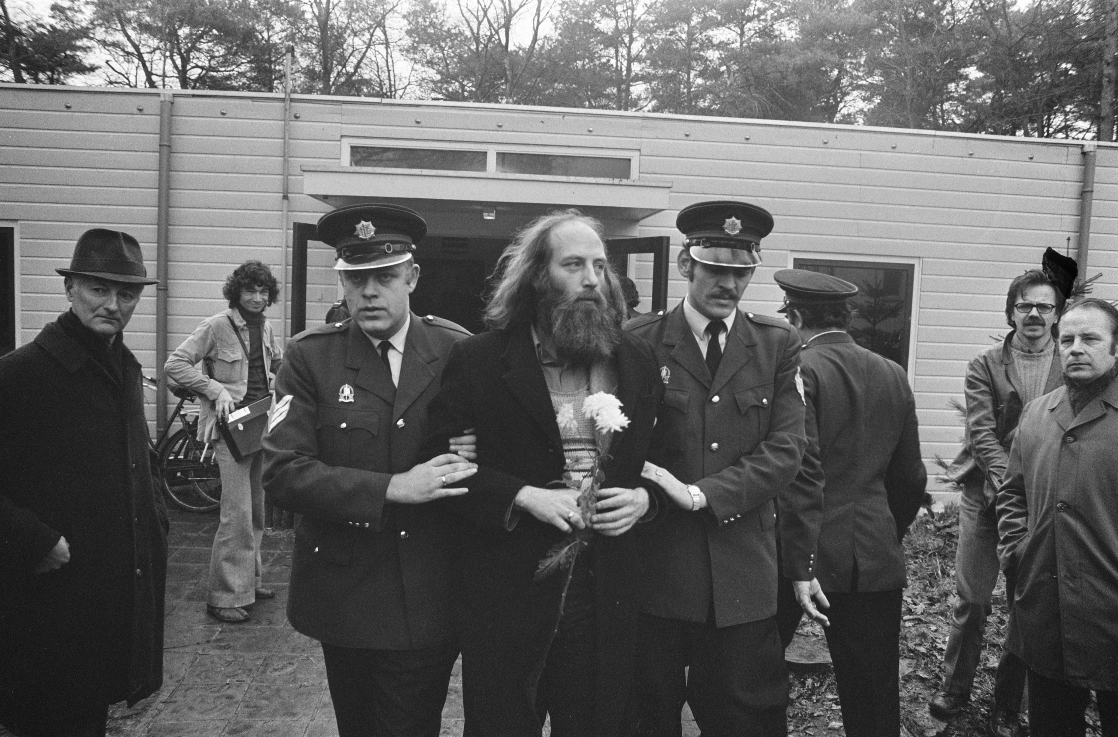 Collectie / Archief : Fotocollectie Anefo Reportage / Serie : De directiekeet van zwakzinnigeninrichting Dennendal in Den Dolder wordt door de politie ontruimd Beschrijving : Carel Muller wordt weggevoerd Datum : 18 januari 1974 Locatie : Den Dolder, Utrecht Trefwoorden : bezettingen, directeuren, klinieken, ontruimingen, politie Persoonsnaam : Muller, Carel Fotograaf : Fotograaf Onbekend / Anefo Auteursrechthebbende : Nationaal Archief Materiaalsoort : Negatief (zwart/wit) Nummer archiefinventaris : bekijk toegang 2.24.01.05 Bestanddeelnummer : 926-9510